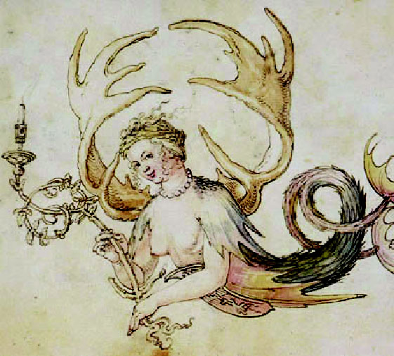 Die Geweihschaufeln eines Elchs bilden ihre Flügel. Entwurf mit Wappen (auf dem Bauch der Sirene) für Crescentia Reiterin, Ehefrau von Willibald Pirckheimer